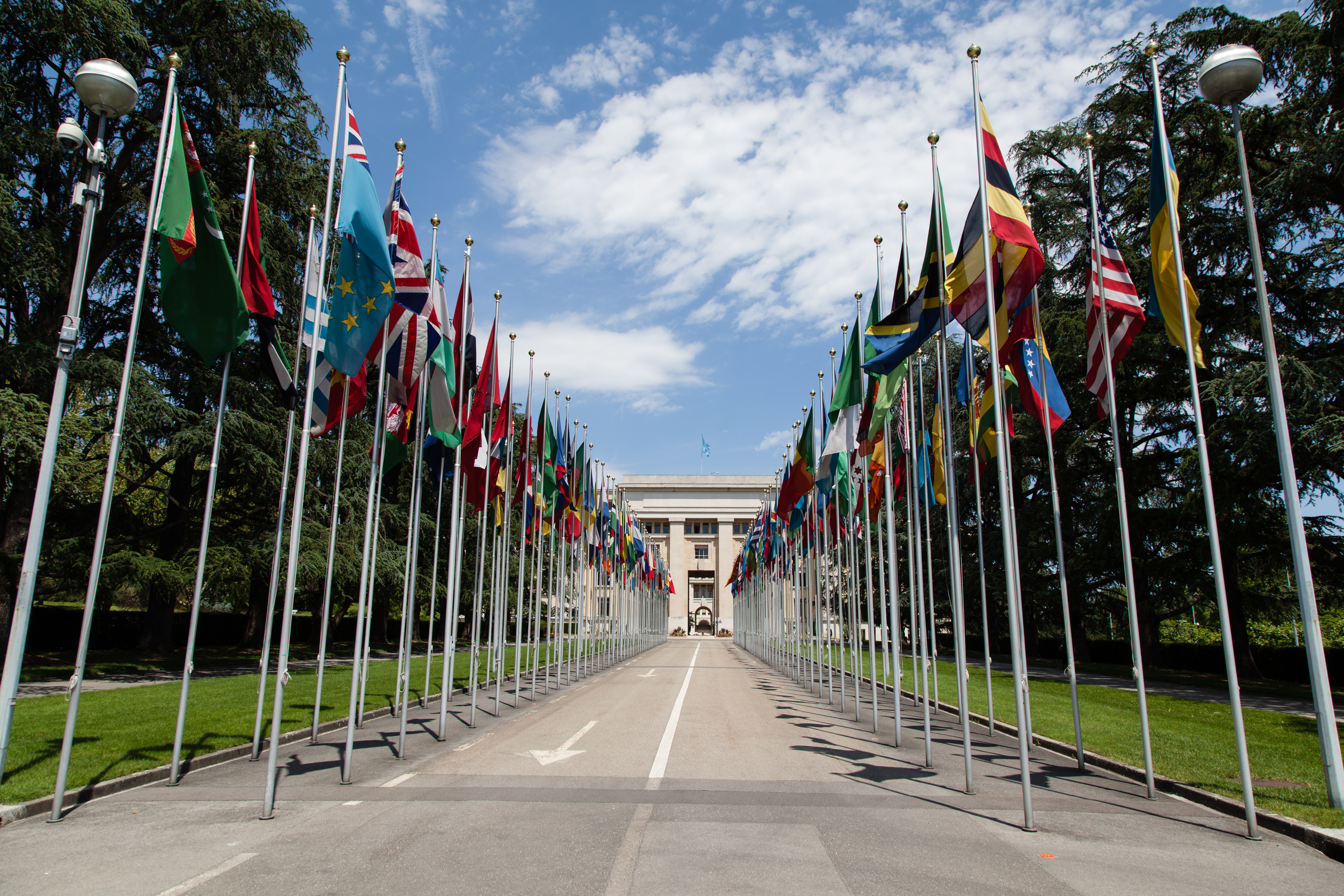 Geneva